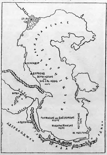 Побереже каспійське в X віцї.